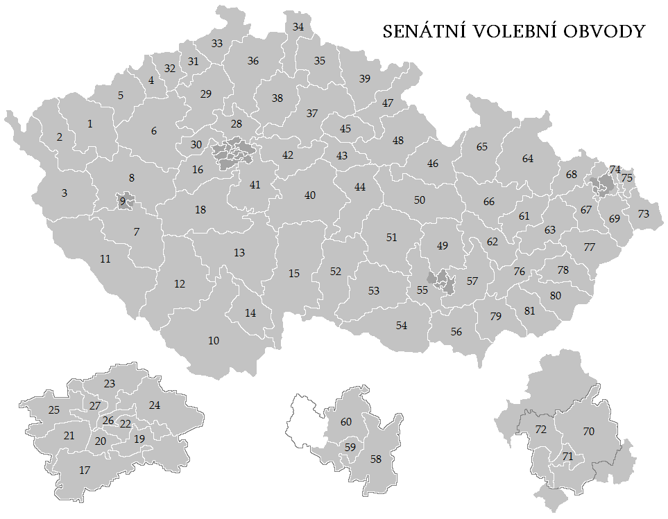 Mapa volebních obvodů při volbách do Senátu Parlamentu České republiky (vyznačeny také hranice měst Prahy, Plzně, Brna a Ostravy)